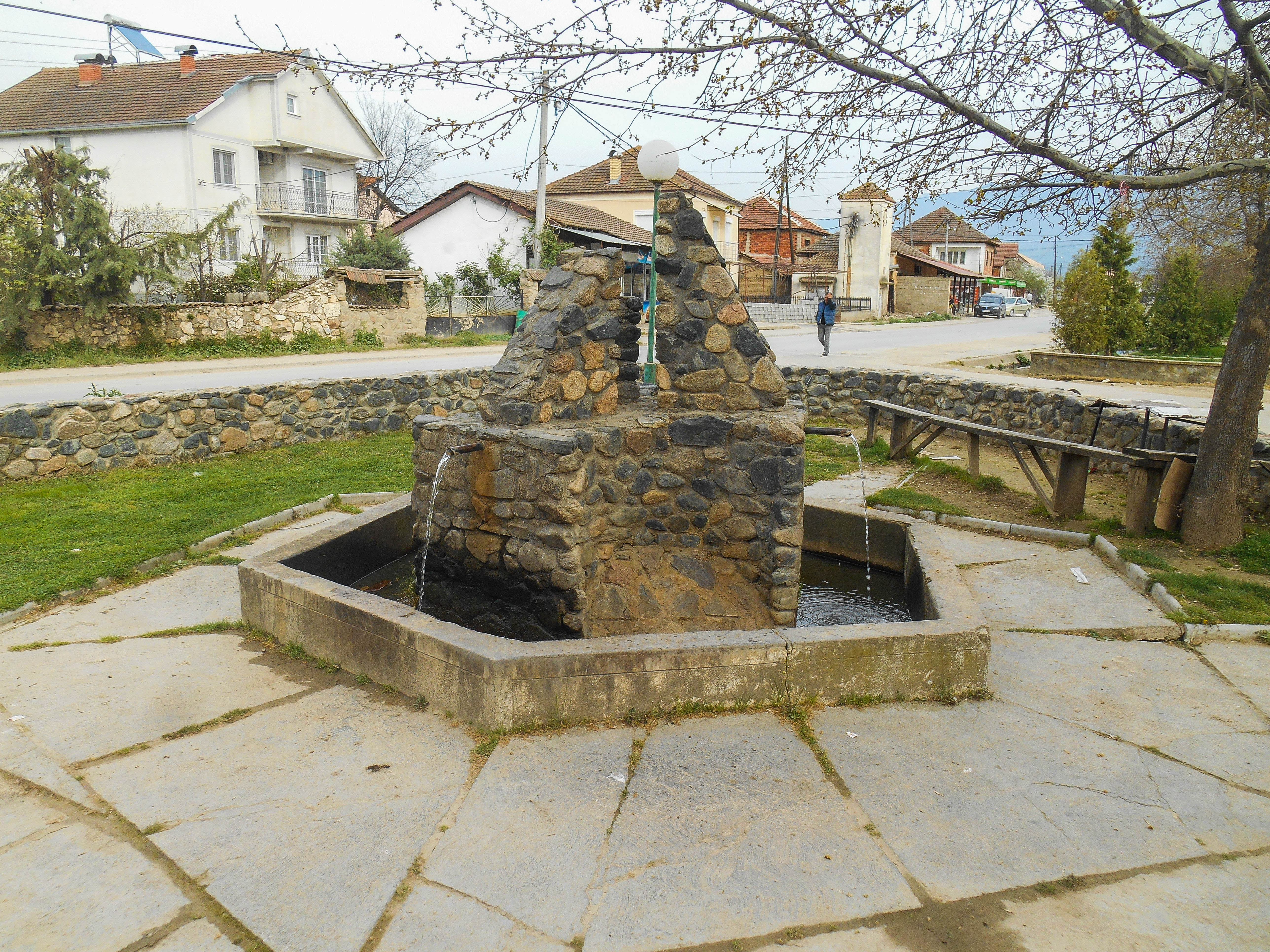 Селска чешма